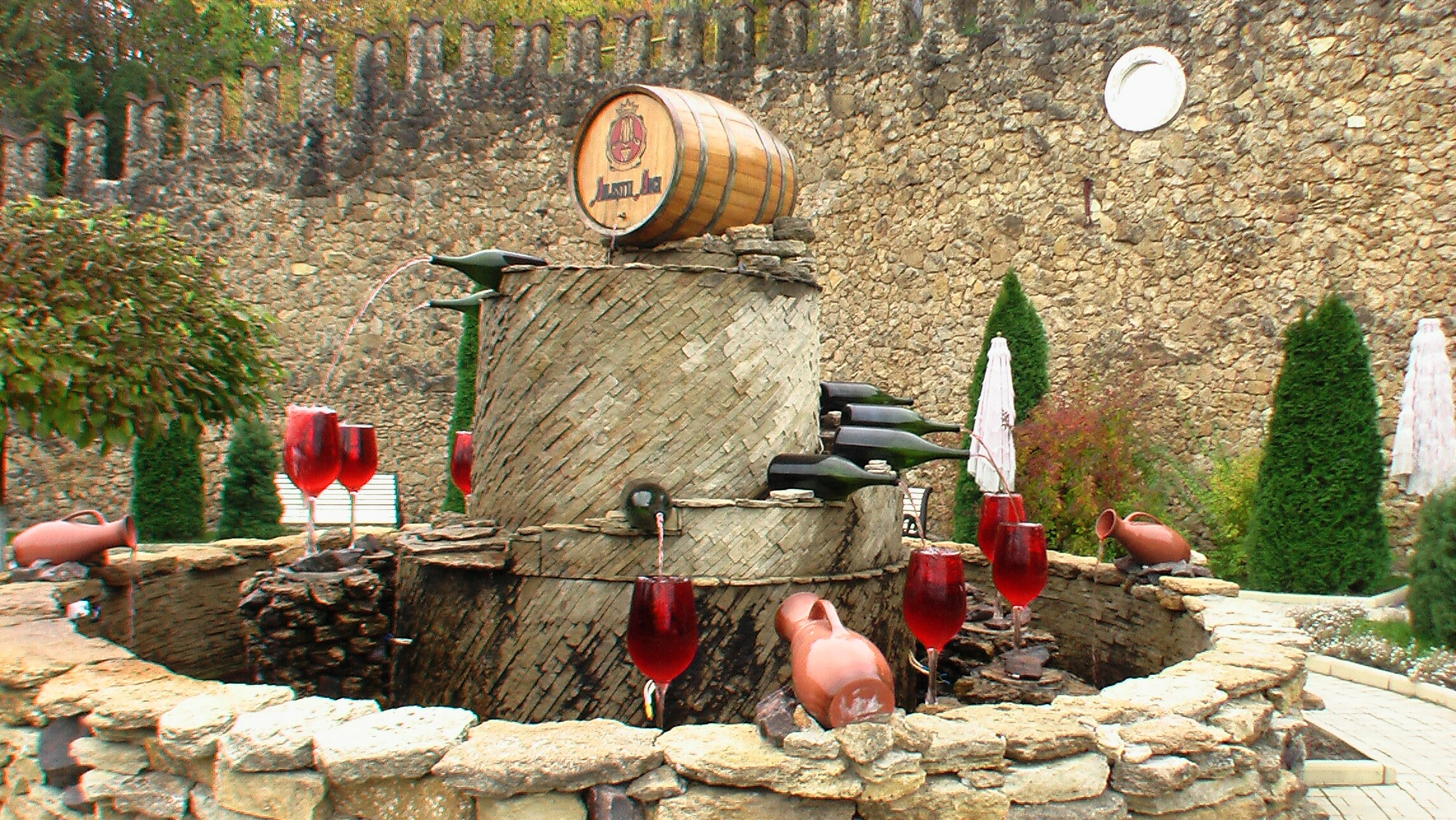 Milestii Mici Brunnen